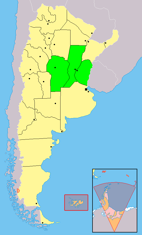 Mapa de Argentina señalando en verde las provincias integrantes de la Región Centro: Córdoba, Santa Fe y Entre Ríos